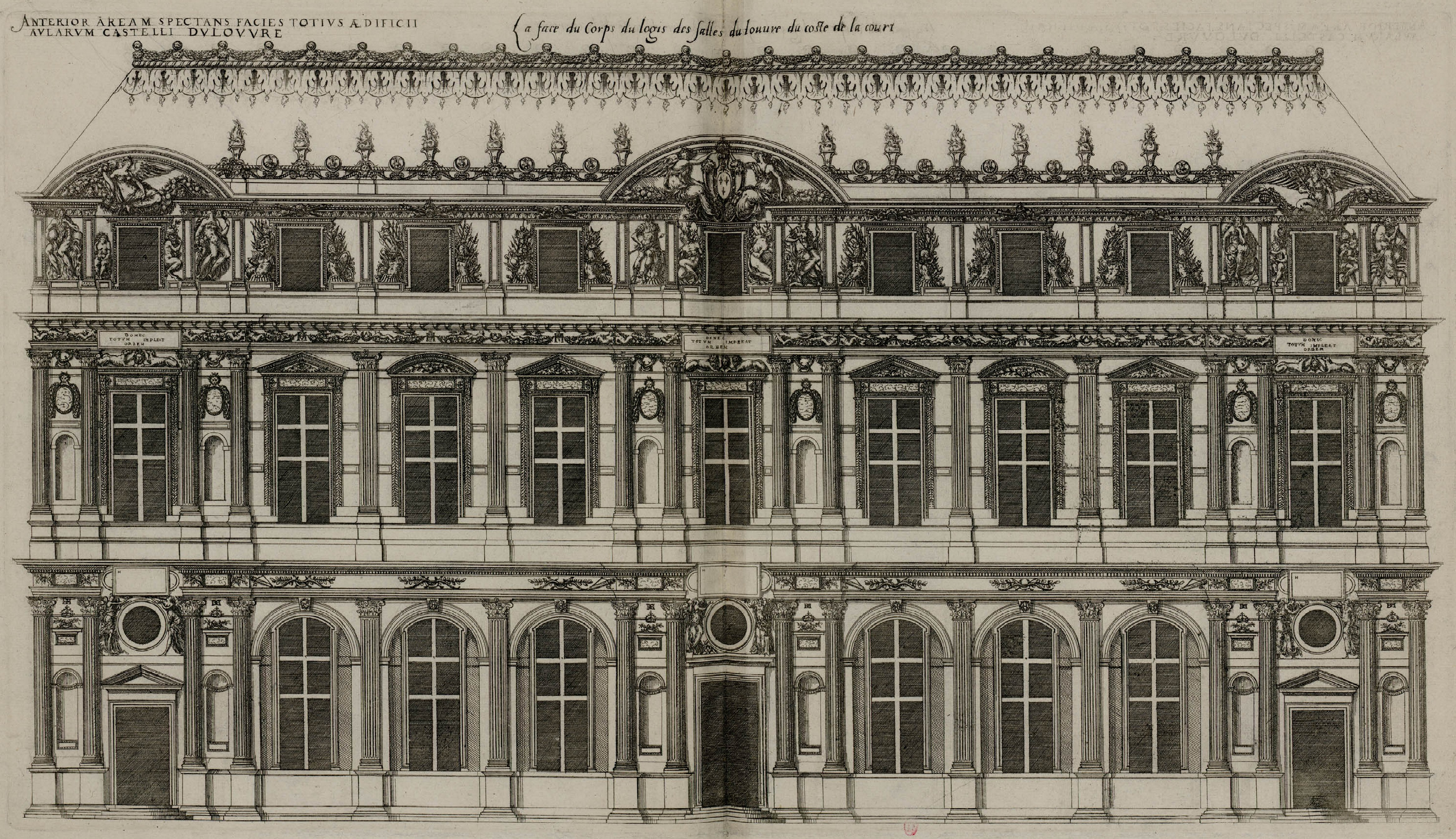 La façade de Pierre Lescot publiée en 1576 par Jacques Androuet du Cerceau.